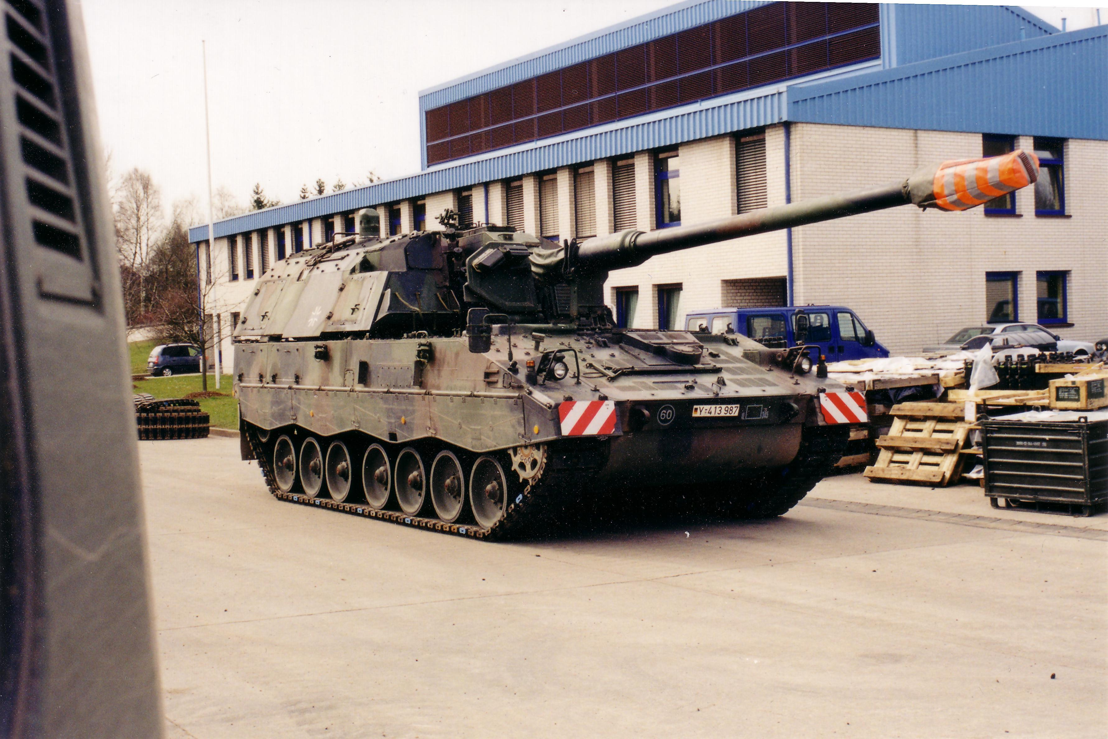 Beschreibung: Panzerhaubitze 2000 (PzH 2000) in der Fahrschule FahrSimKette Baumholder Datum: Februar 2002 Autor: Sonaz